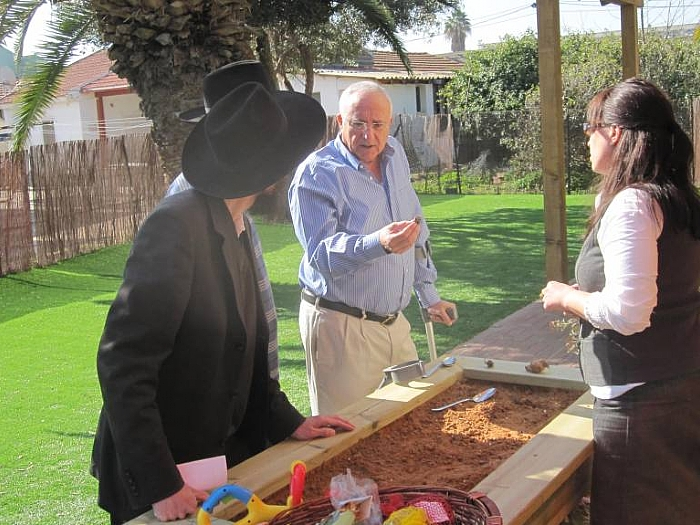 אמנון ליפקין שחק מבקר ביד לילד המיוחד